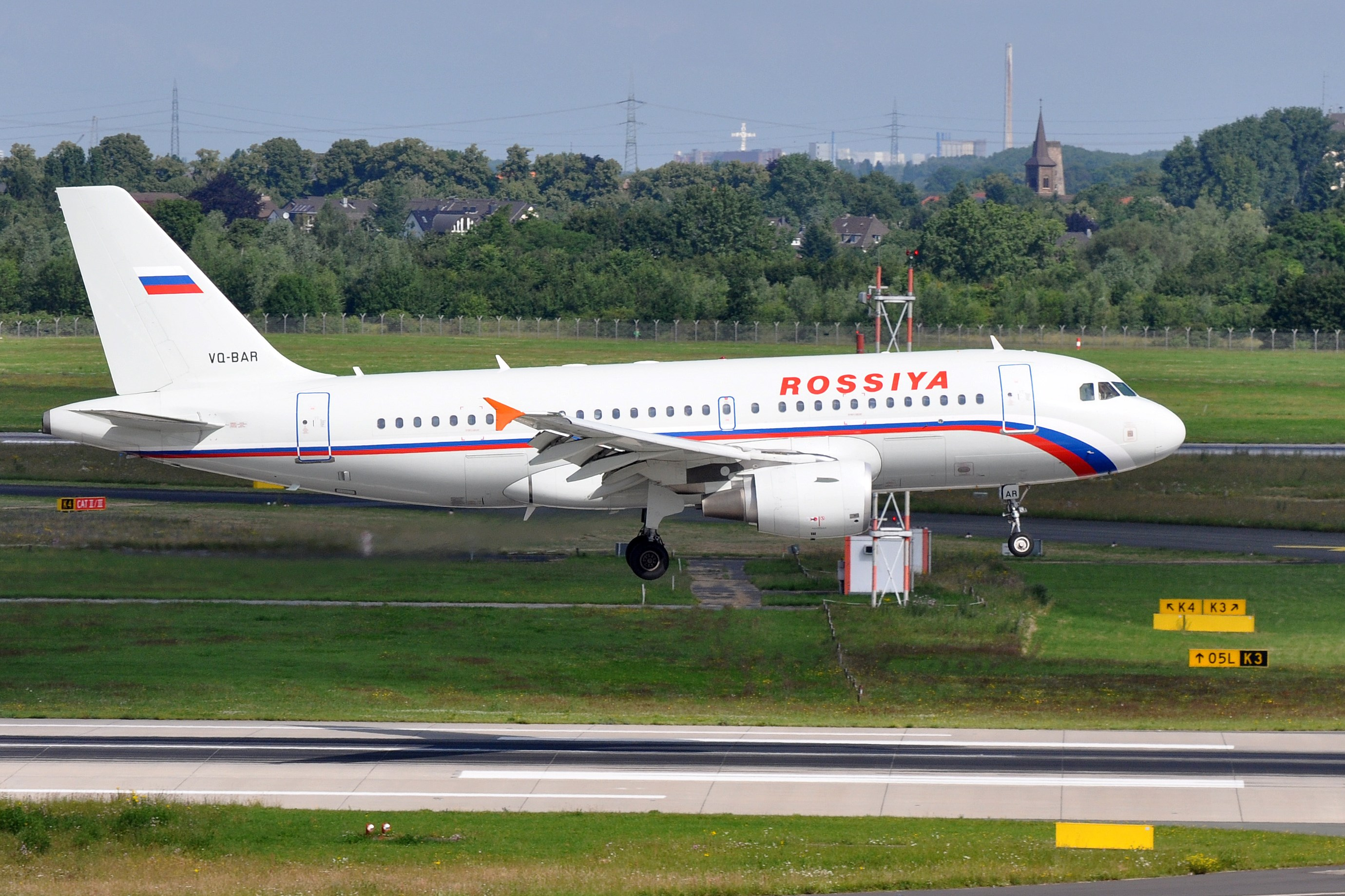 MSN 1488 A319-111 ROSSIYA DUS EX FRONTIER AIRLINES AS N901FR